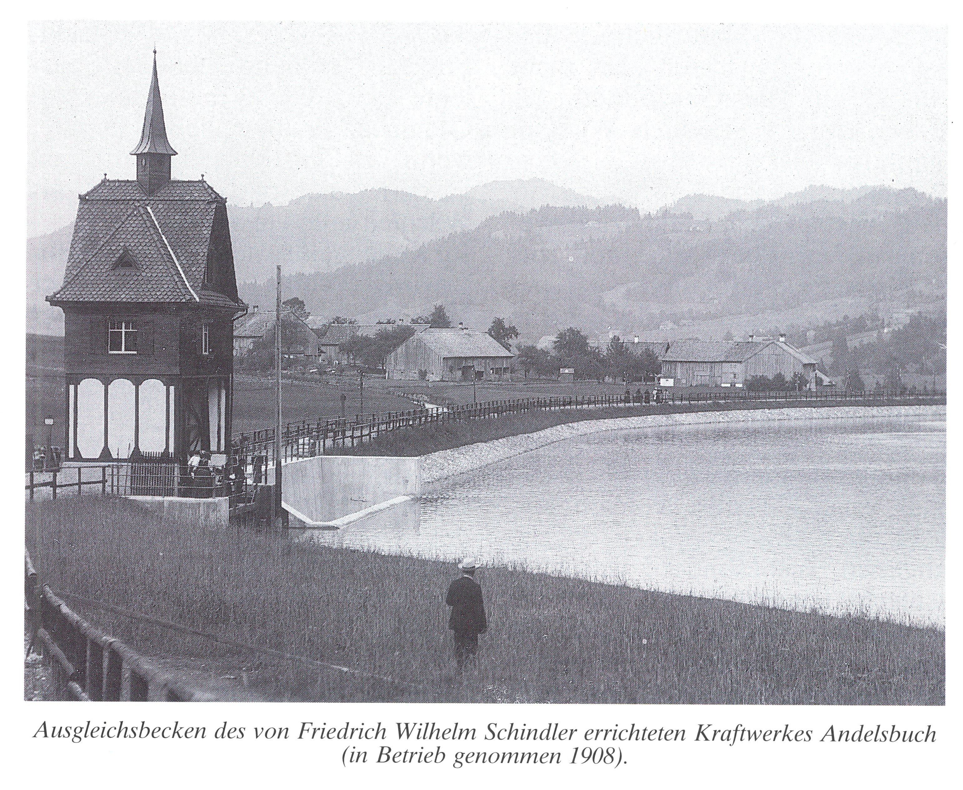 Ausgleichsbecken des von Friedrich Wilhelm Schindler errichteten Kraftwerkes Andelsbuch in Vorarlberg, (in Betrieb genommen 1908.